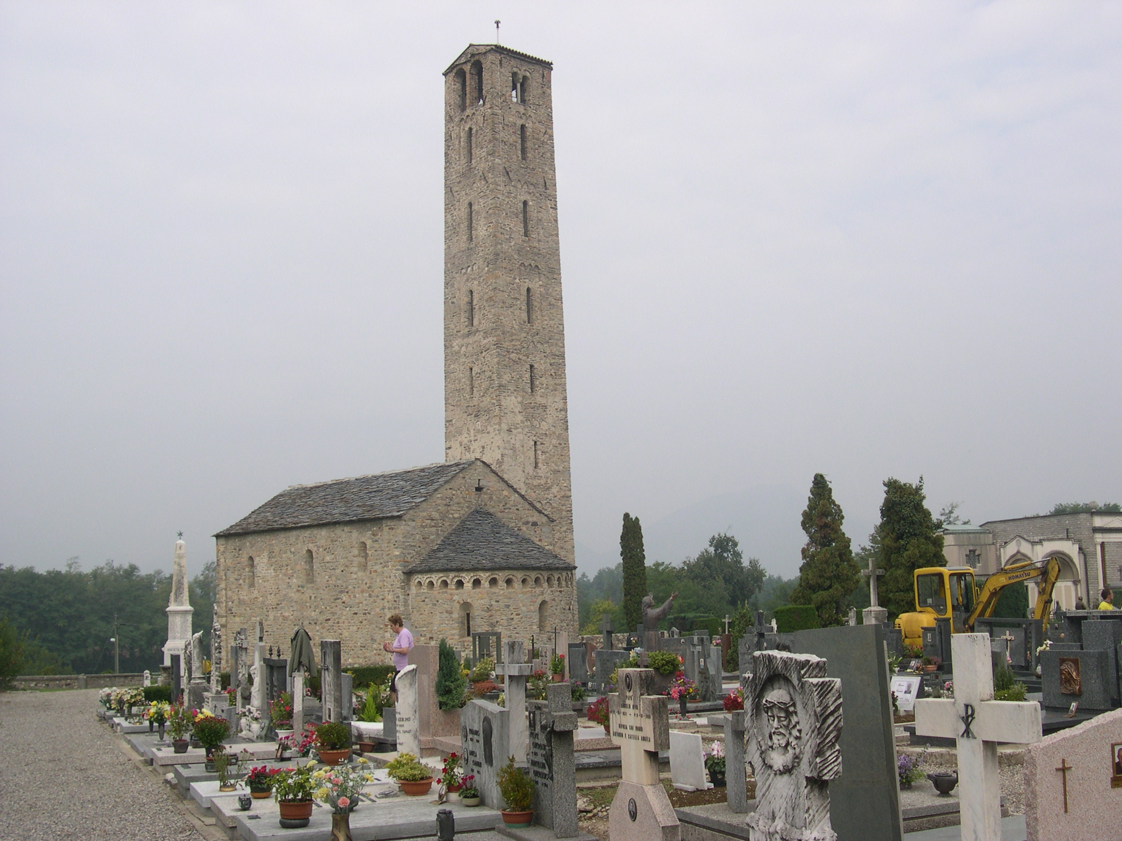 Creato da Niccolò Luoni 30.09.06 - Chiesa Ligurno